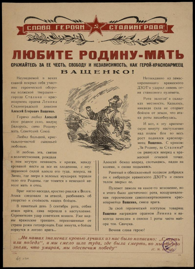 Листовка выпущенная в 1942 - 1943 годах. Листовка посвящена подвигу Алексея Егоровича Ващенко закрывшего своим телом вражеский дзот. Подвиг был совершён 5 сентября 1942 года на юго-западной окраине Сталинграда.